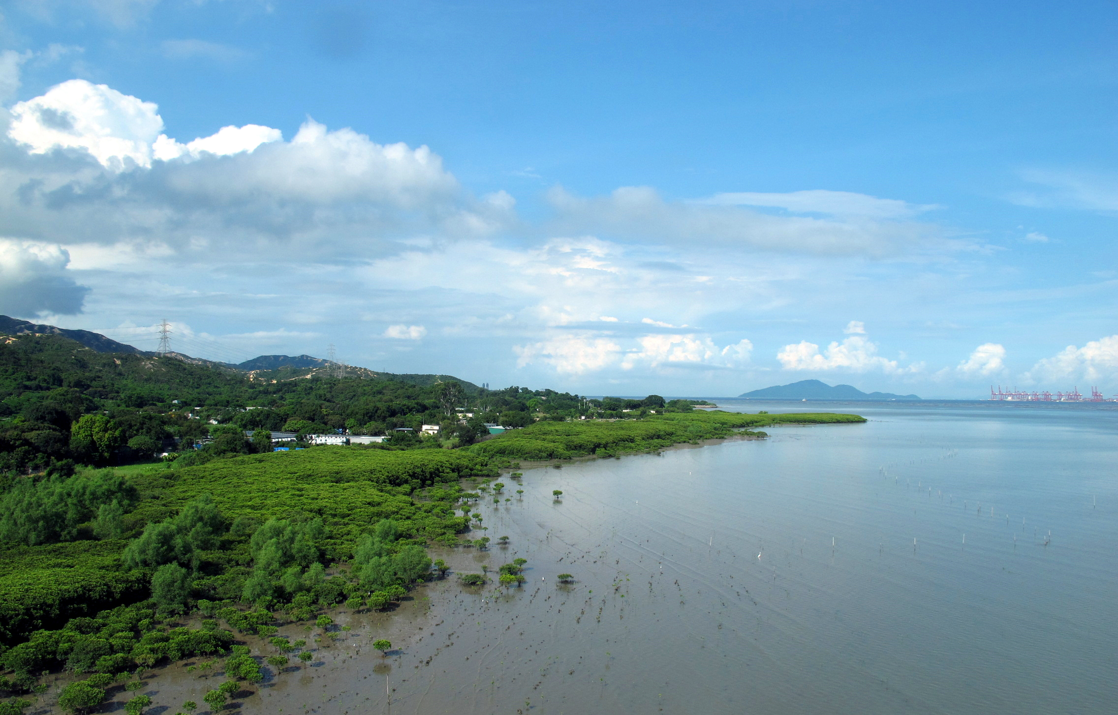 Sheung Pak Lai